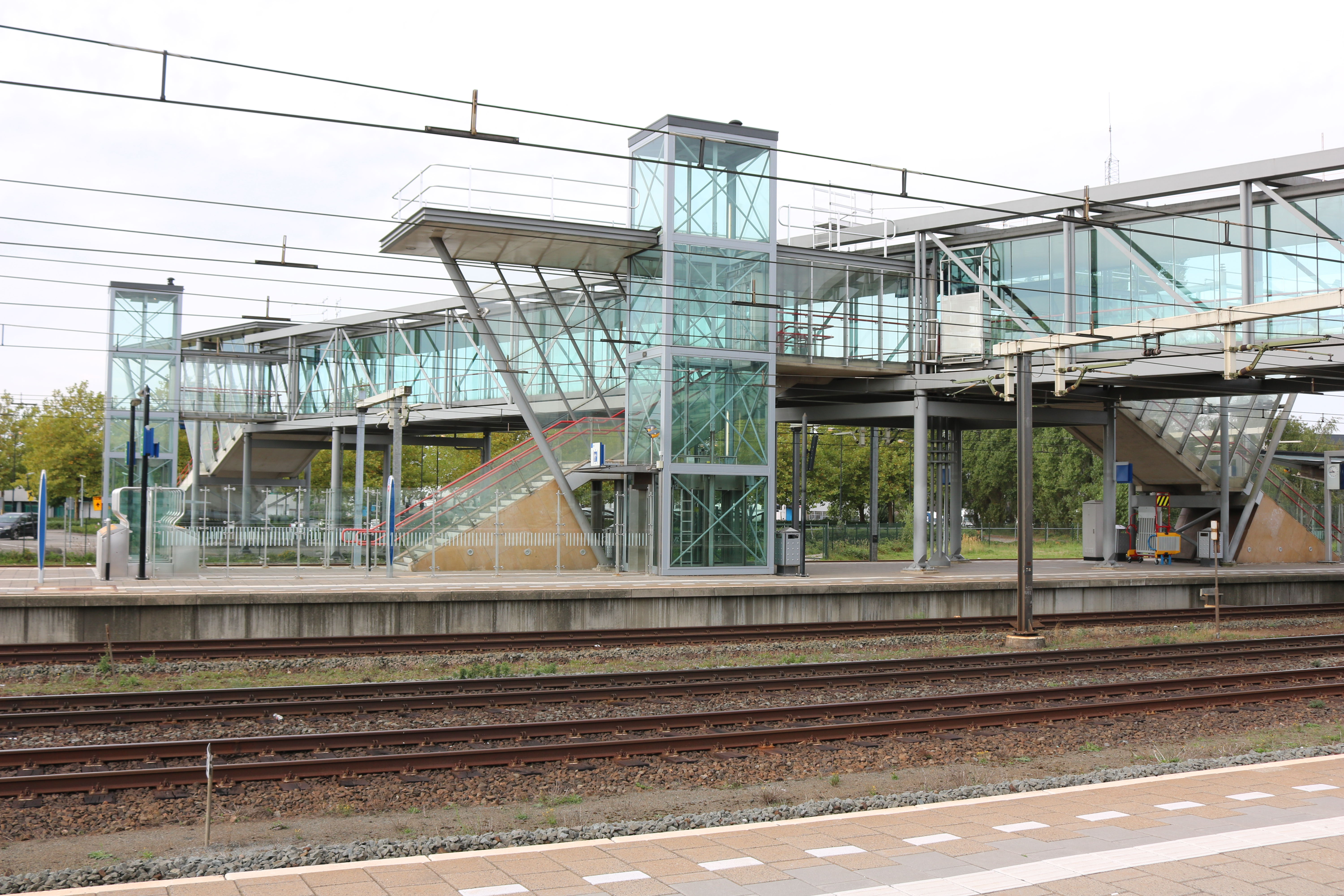 Boxtel - Luchtbrug uit 1998 (foto Daniel van der Ree, 8 september 2018)